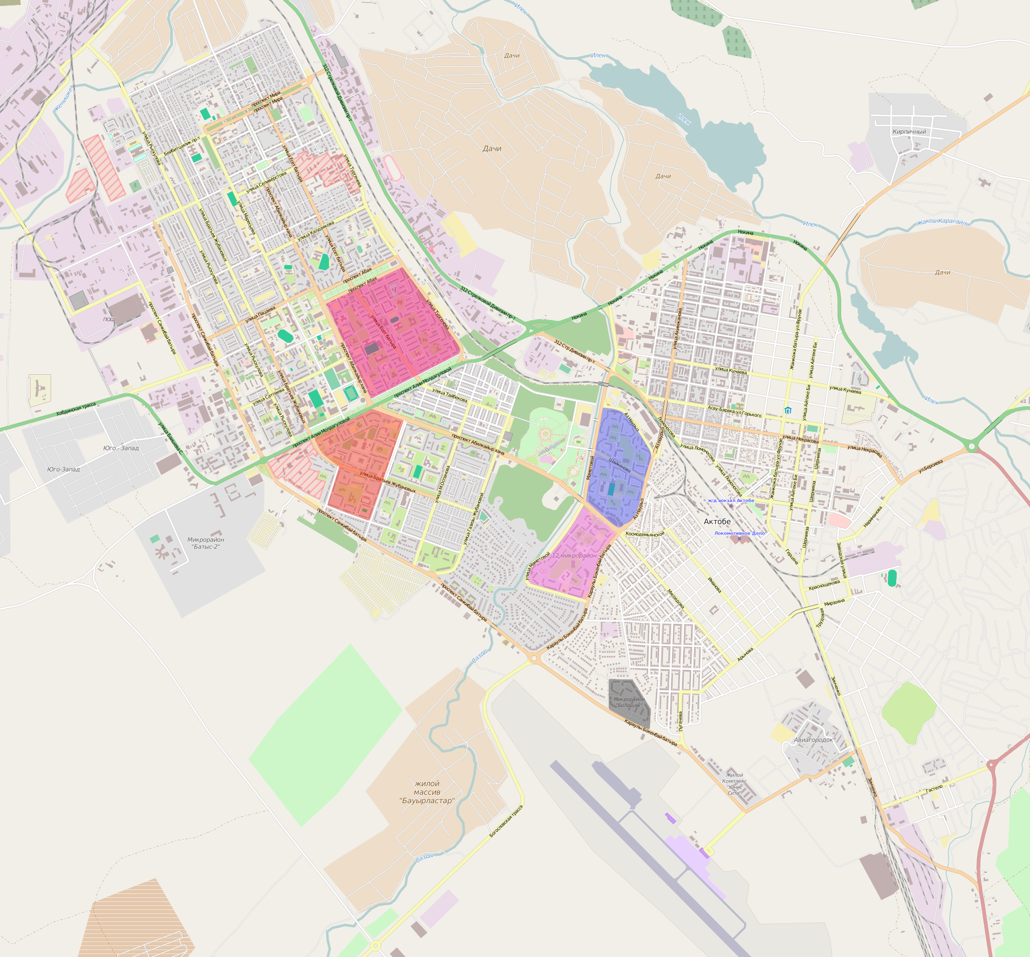 Микрорайоны Актобе. This map may be incomplete, and may contain errors. Don't rely solely on it for navigation.